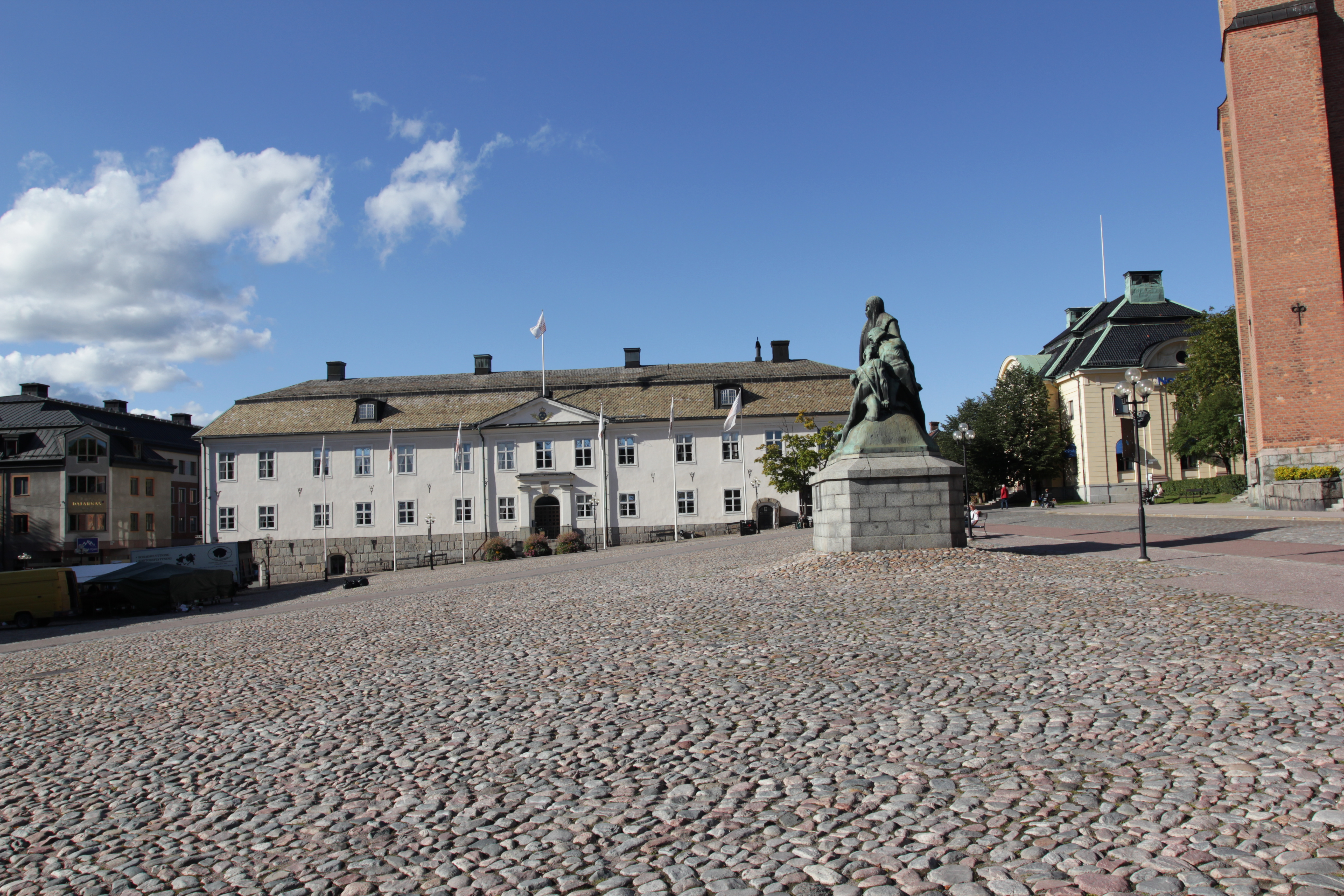 Stora torget, Falun, Sverige. Engelsbrektsstatyn och rådhuset rakt fram.